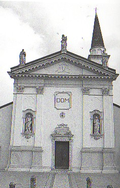 Grantorto: la chiesa parrocchiale dei santi Biagio e Daniele.